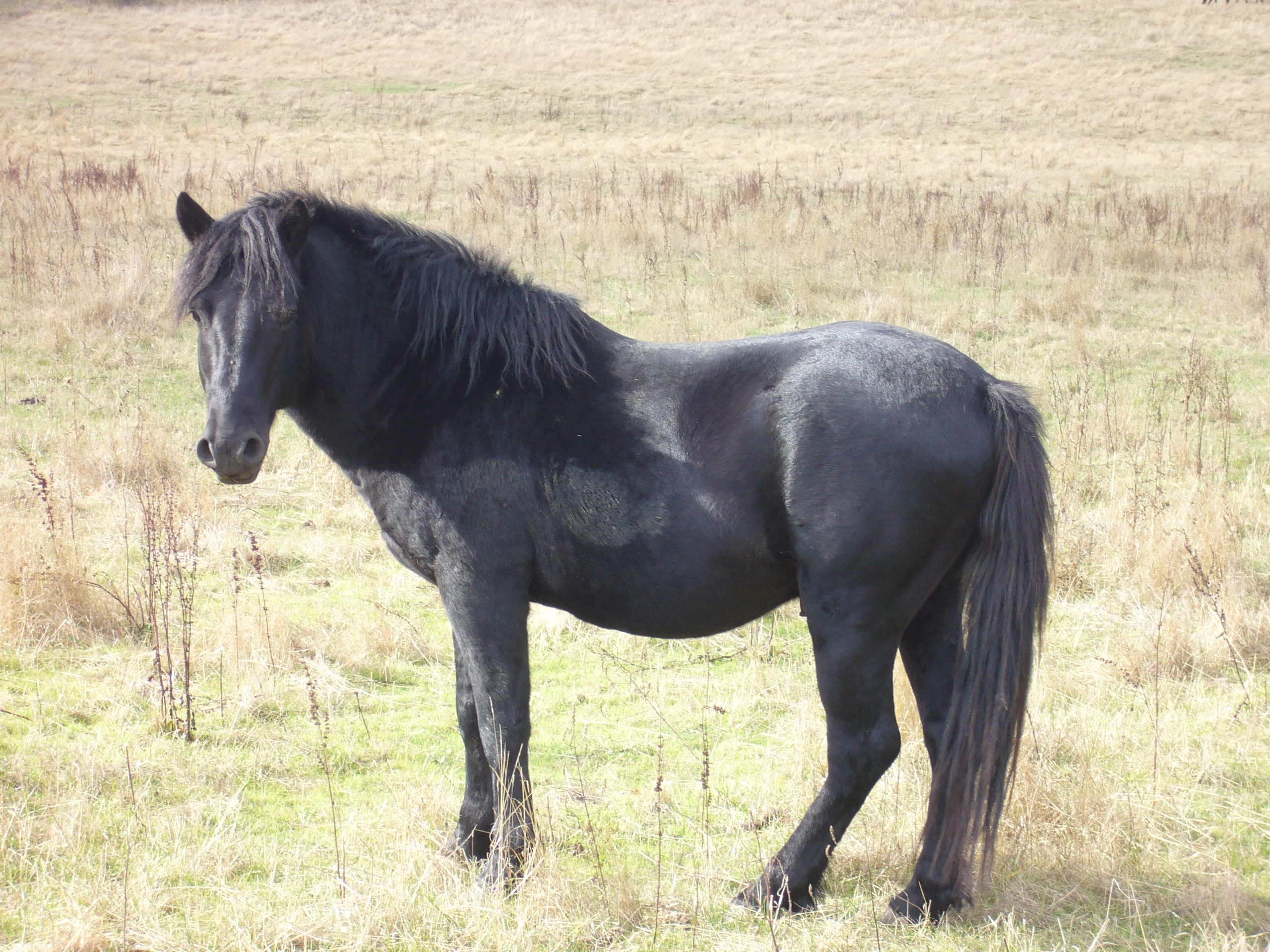 Zaldia Pancorbon